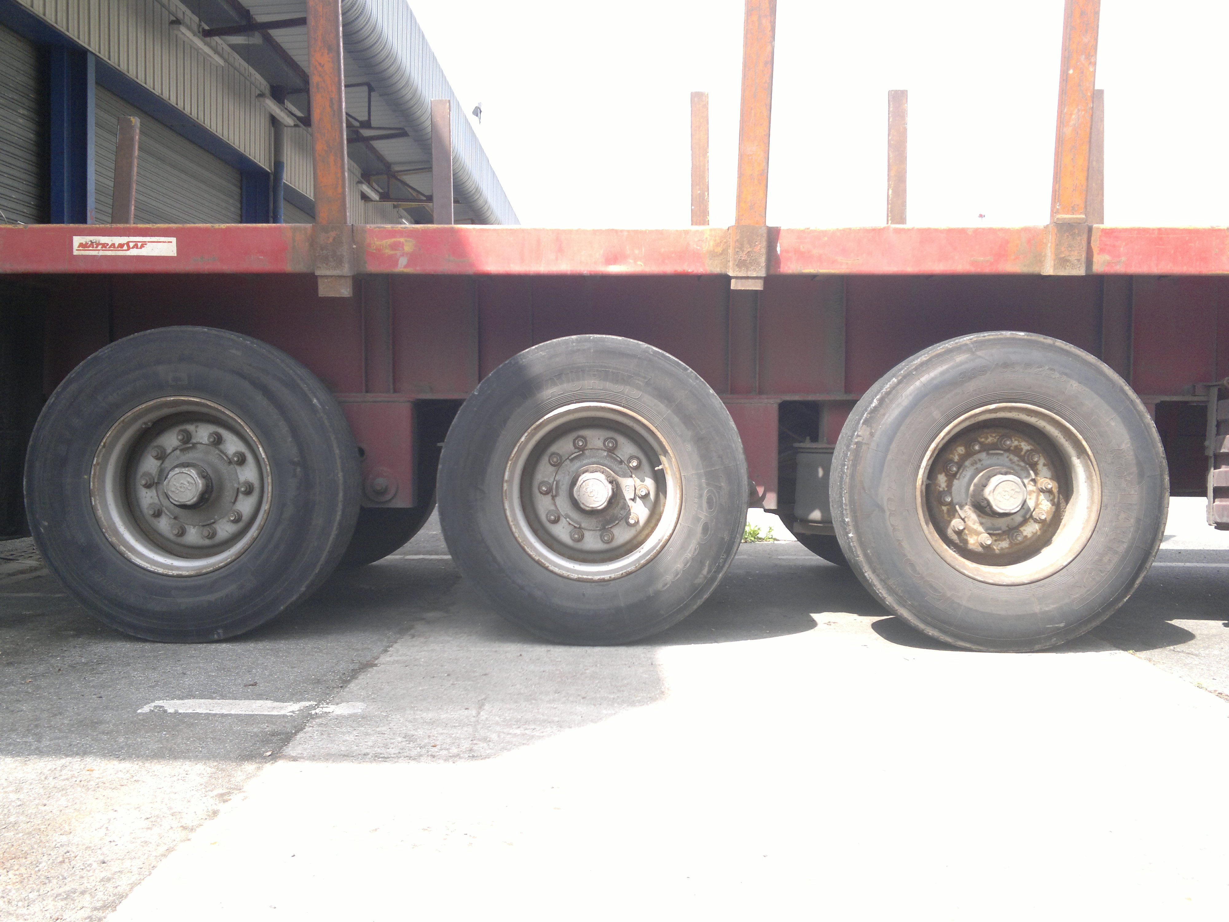 Tridem de semi-remorque porte-conteneurs.